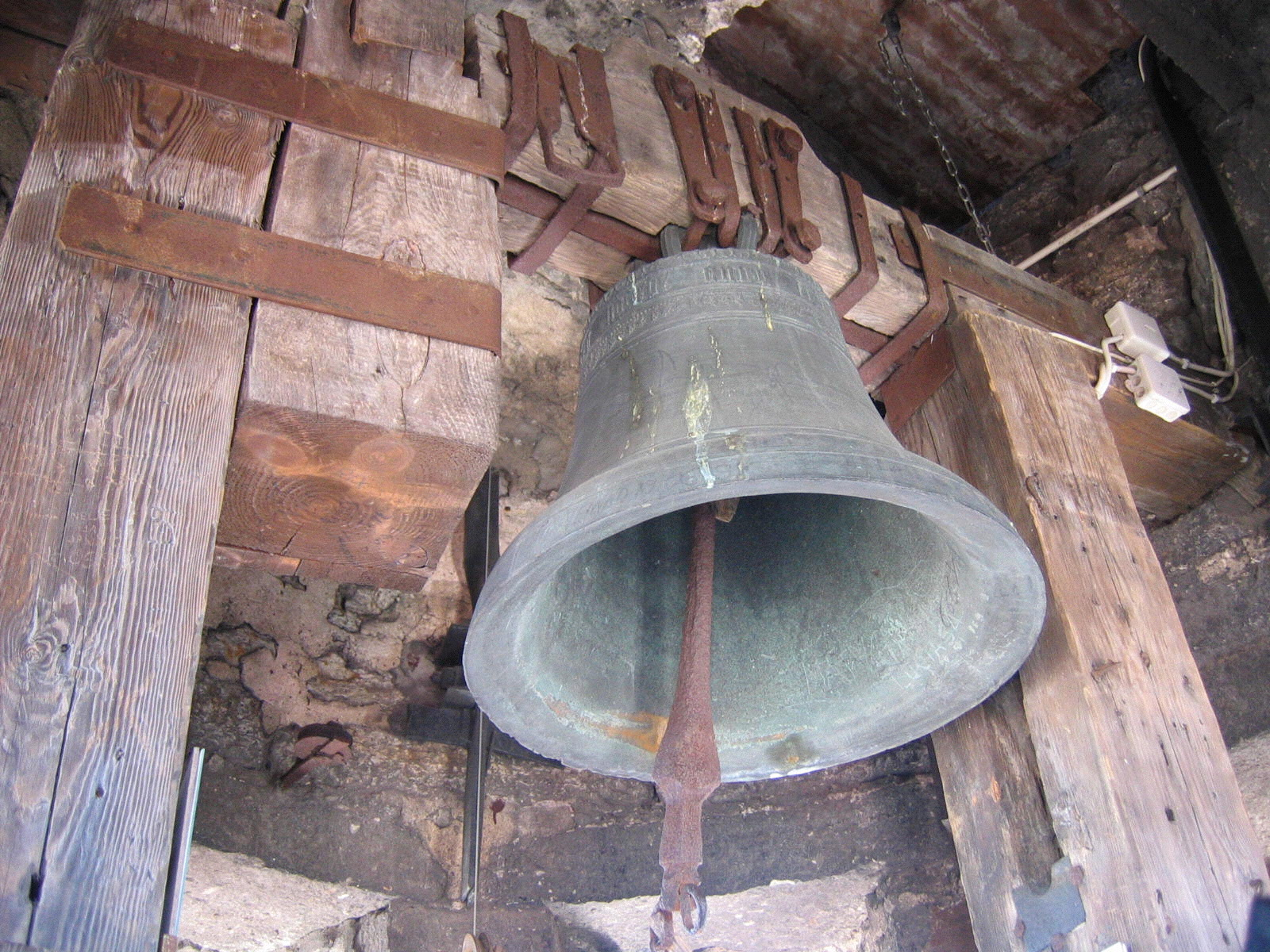 Tallinna raekoja kell.